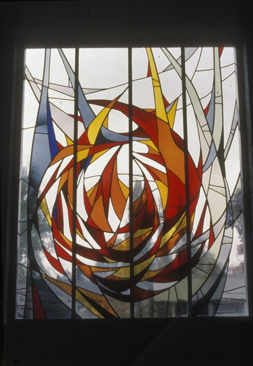 Bejaardenhuis 't Höfke: Interieur kapel, gebrandschilderde glas : "Psalm 139", middelste van de serie van 3 ramen, van beeldend kunstenaarTed Felen, 1983 (opmerking: Dia door kunstenaar Ted Felen geschonken aan de Rijksdienst voor de Monumentenzorg)